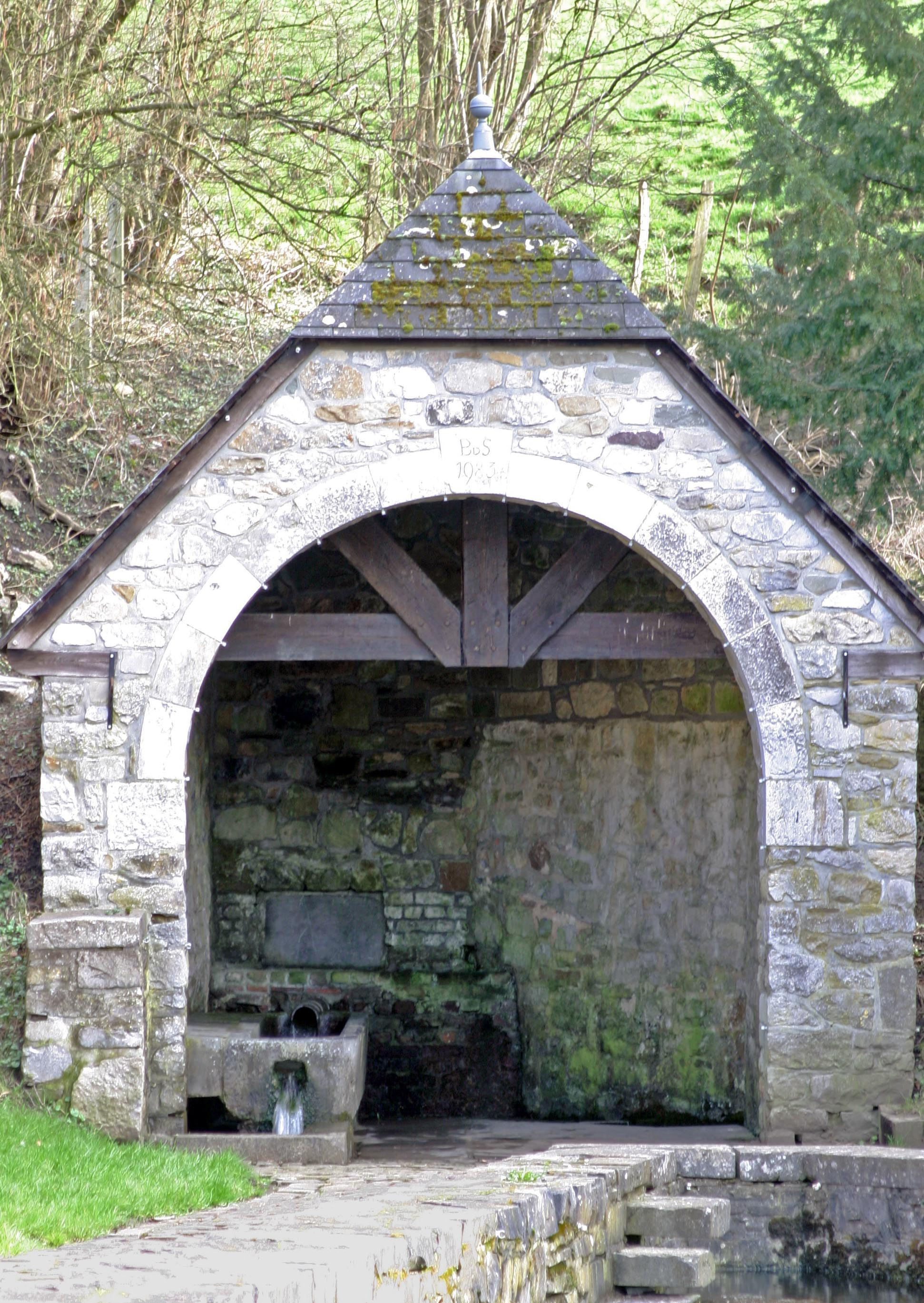 Sujet:Soiron Wäschbur